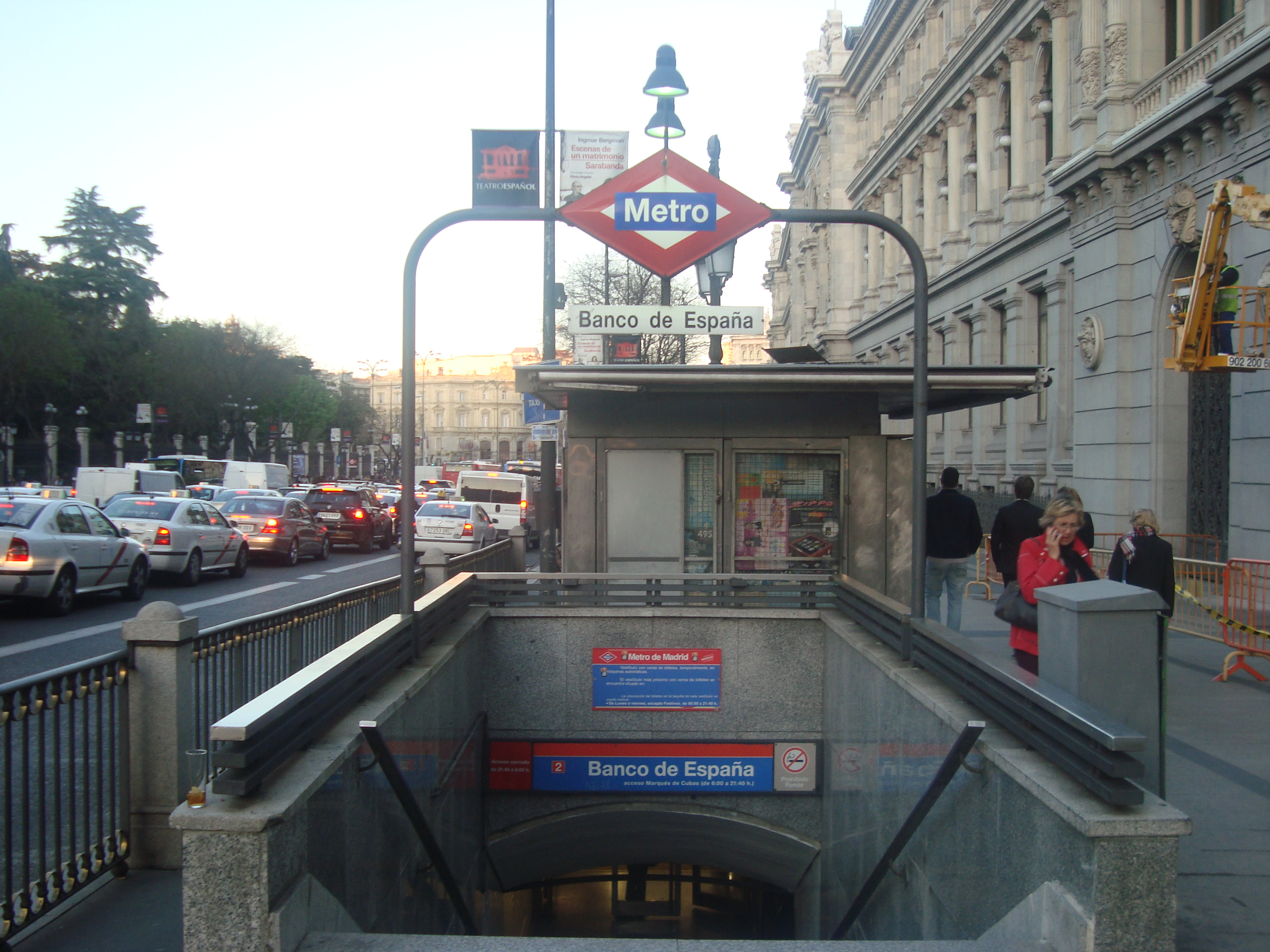 Boca de Metro de Madrid en Banco de España.